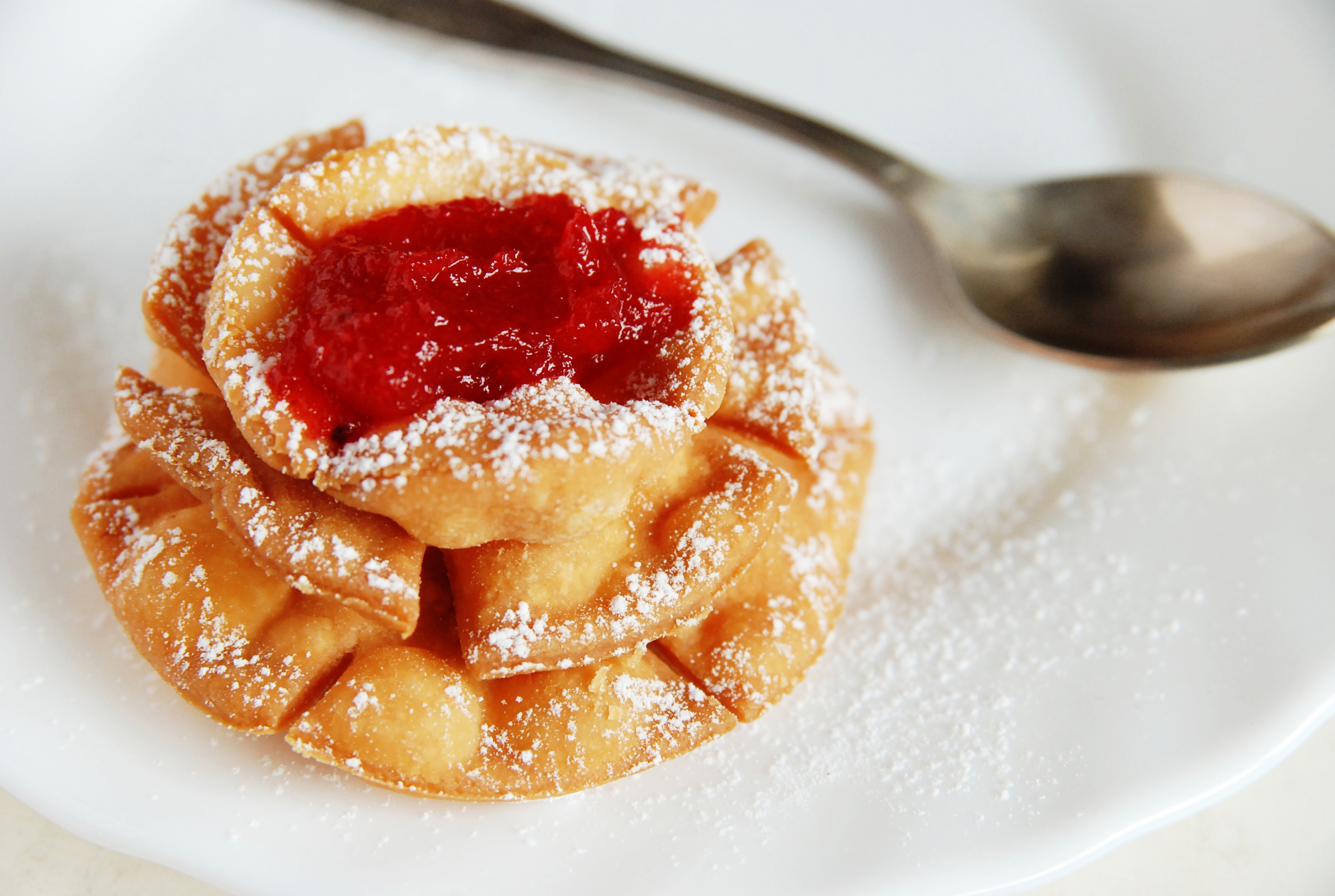 Róża karnawałowa domowej roboty